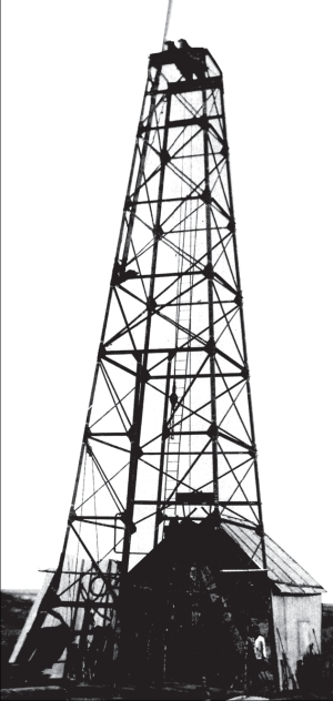 The first oil well in Argentina, sited in Comodoro Rivadavia, Chubut.